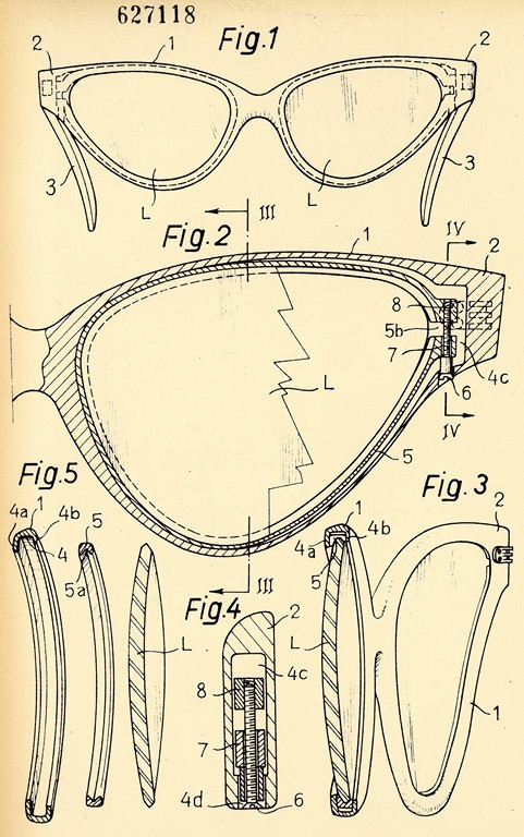 Disegno per il brevetto per invenzione industriale n. 627118, classe G 02 c., della società Filom di Angela Brunera per una montatura metallica per occhiali, Milano. Data di deposito: 14 aprile 1960. Data di concessione: 25 ottobre 1961 (AS Genova, Ufficio provinciale industria, commercio e artigianato di Genova, Fondo Brevetti)